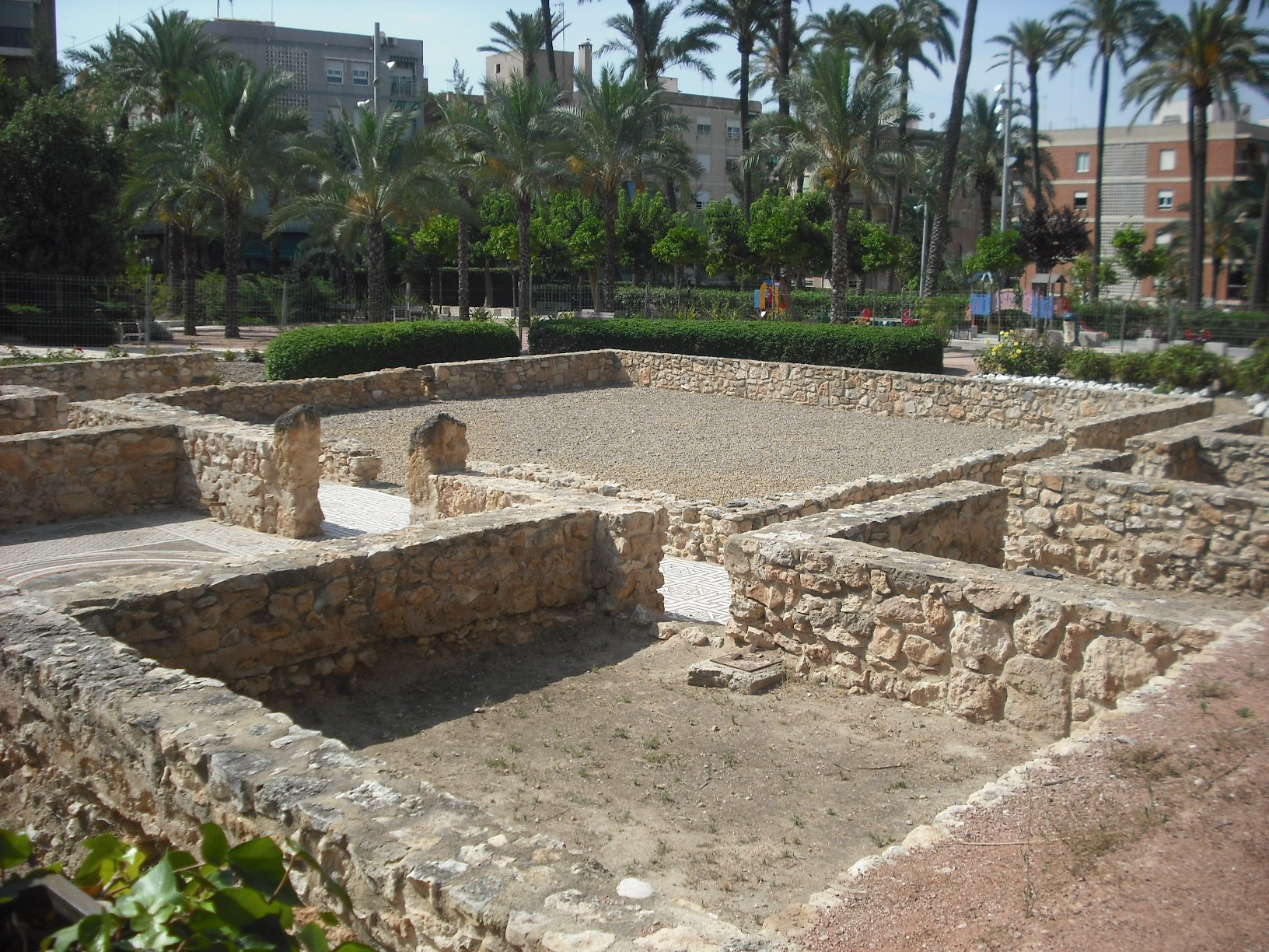 Villa romana del Palmeral.